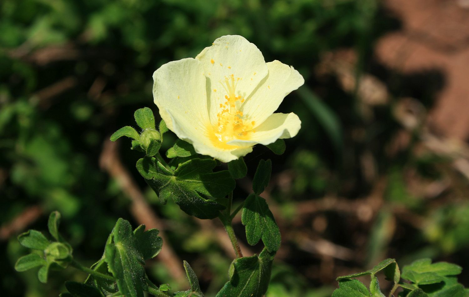 Pavonia dregei, Malvengewächse (Malvaceae), Malvoideae – Südafrika/South Africa: KwaZulu-Natal, Hluhluwe–iMfolozi Park, Maphumalo Picnic Site, ca. 20 km SW Hluhluwe, ca. 90 m